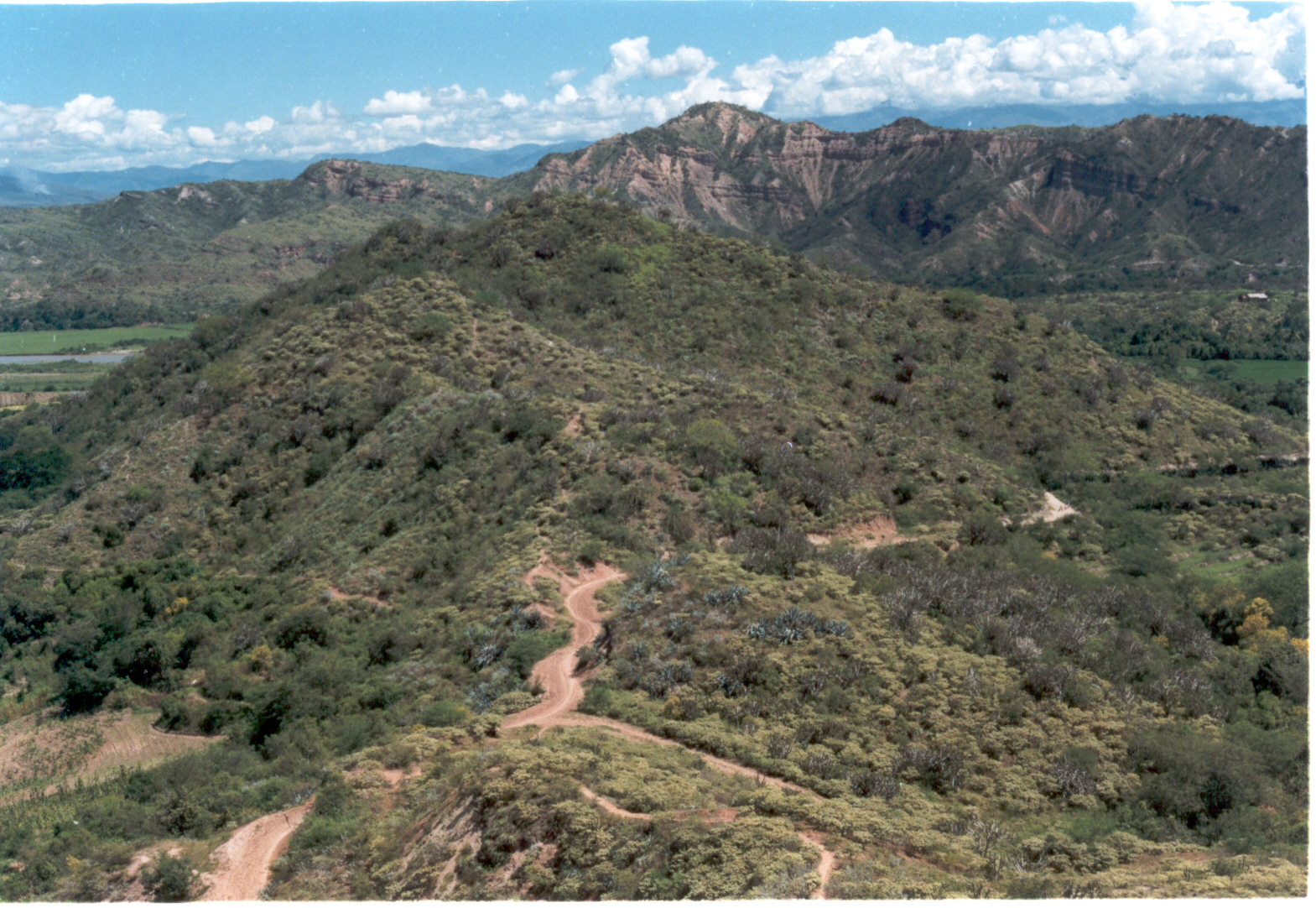 Cerro Brujupata que rodea la localidad de Bagua, tiene mucha historia y misterios